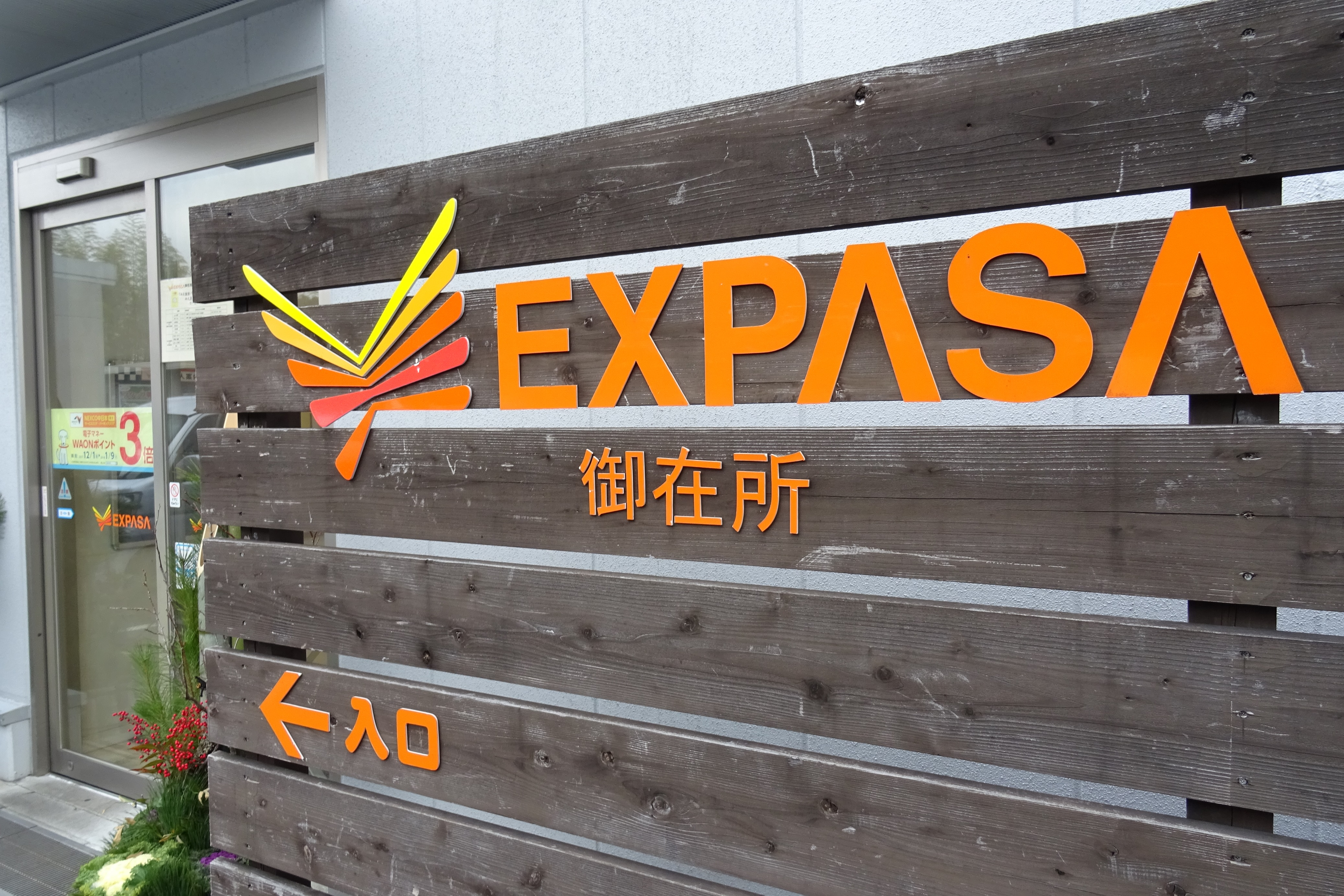 御在所ぷらっとパーク